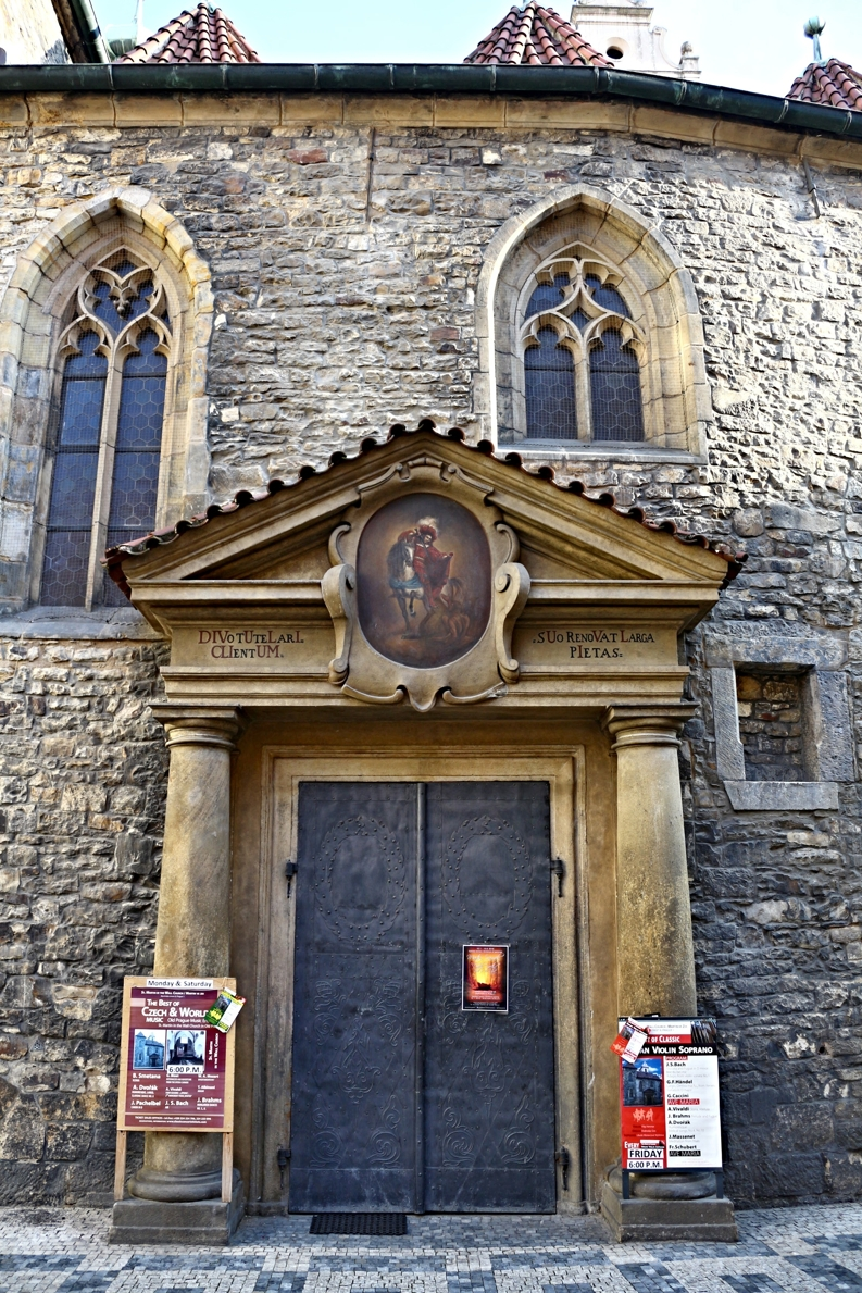 Praha 1-Staré Město, kostel sv. Martina ve zdi